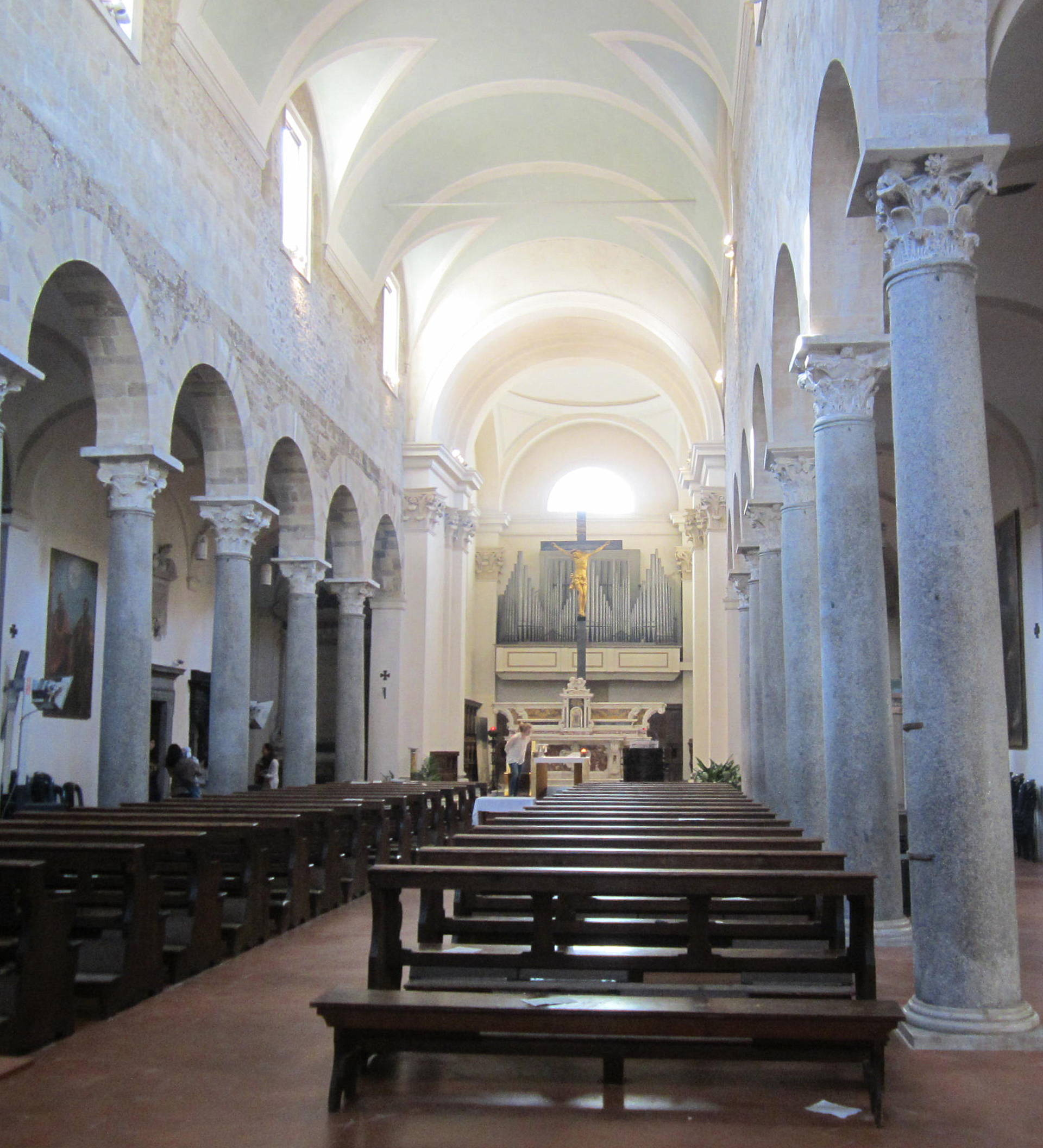 Chiesa di San Frediano a Pisa interno